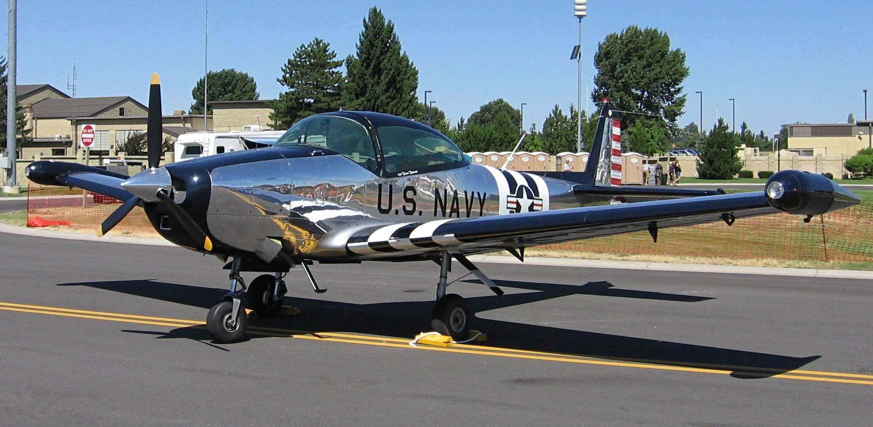 N4591K - 1958 Ryan Navion A